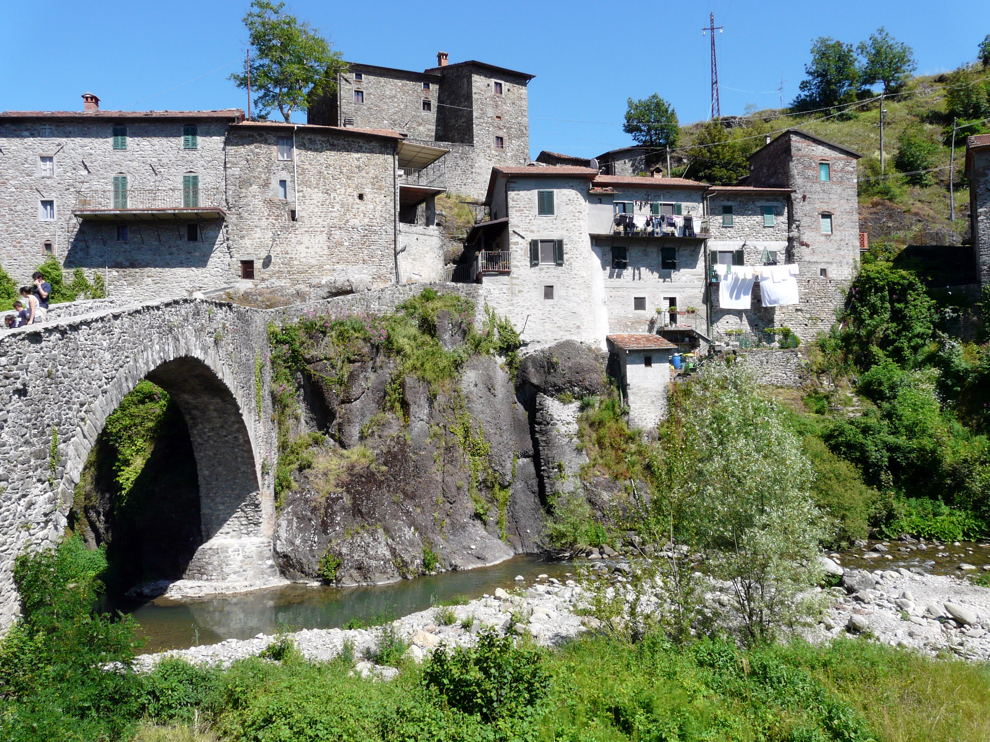 Il ponte medievale e il borgo di San Michele, Piazza al Serchio, Toscana, Italia